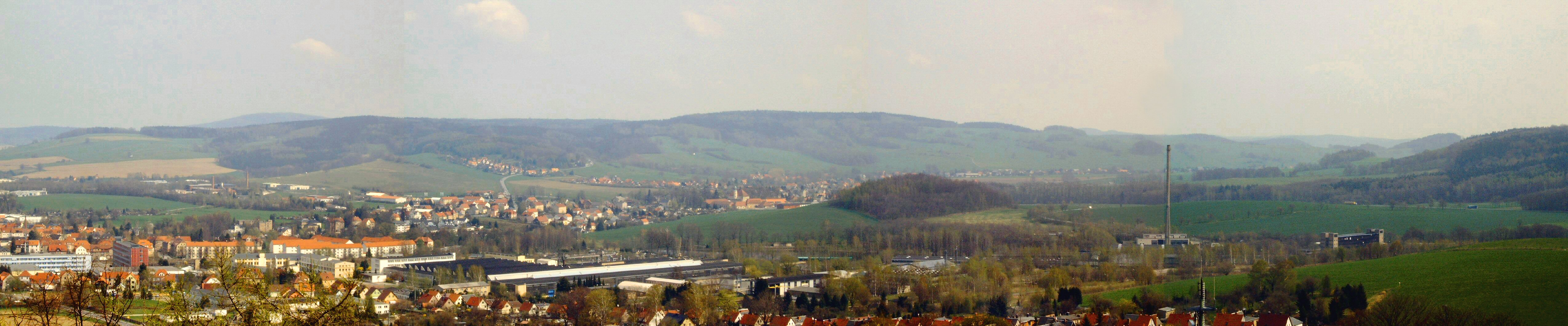 Panoramabild des Hohwaldgebietes von der Götzinger Höhe aus aufgenommen